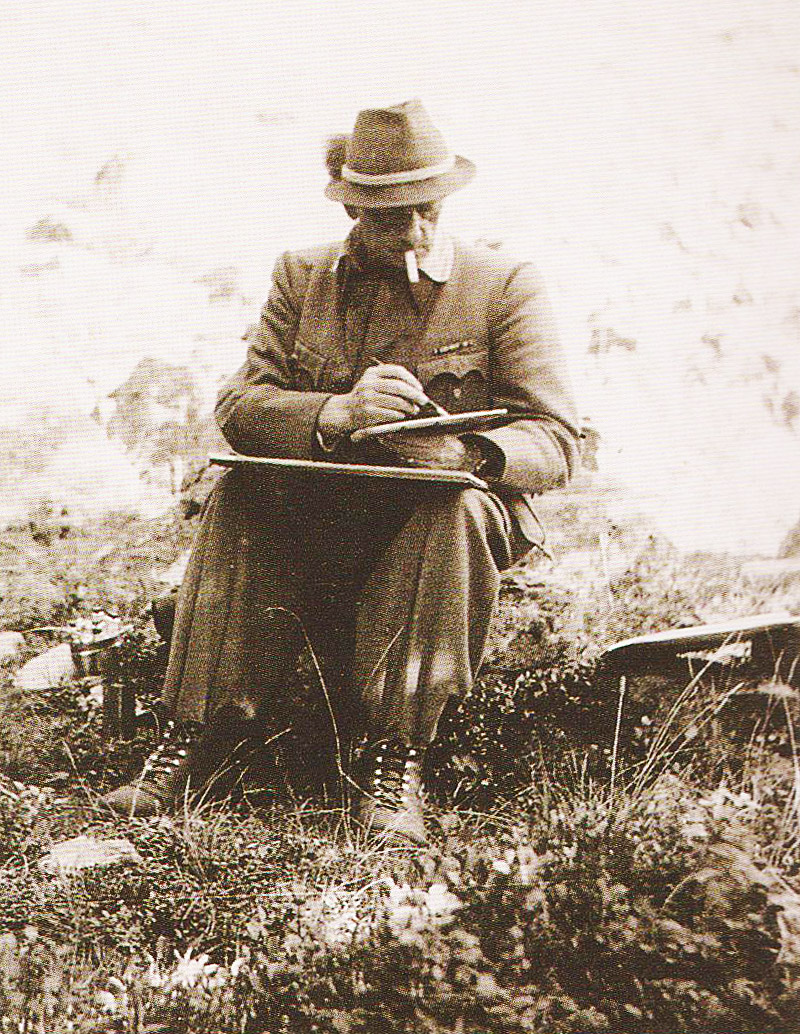 Bild "Hans Bertle 1942" von 1942